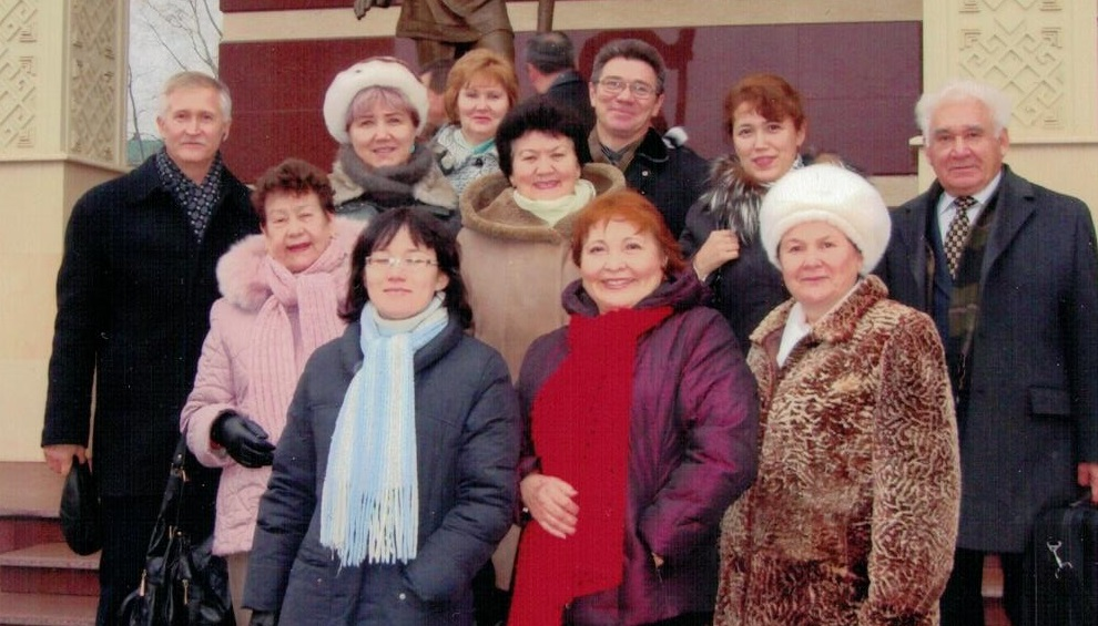 Члены Общественной Палаты Башкортостана в Самаре. Выездное заседание ОП РФ 2011